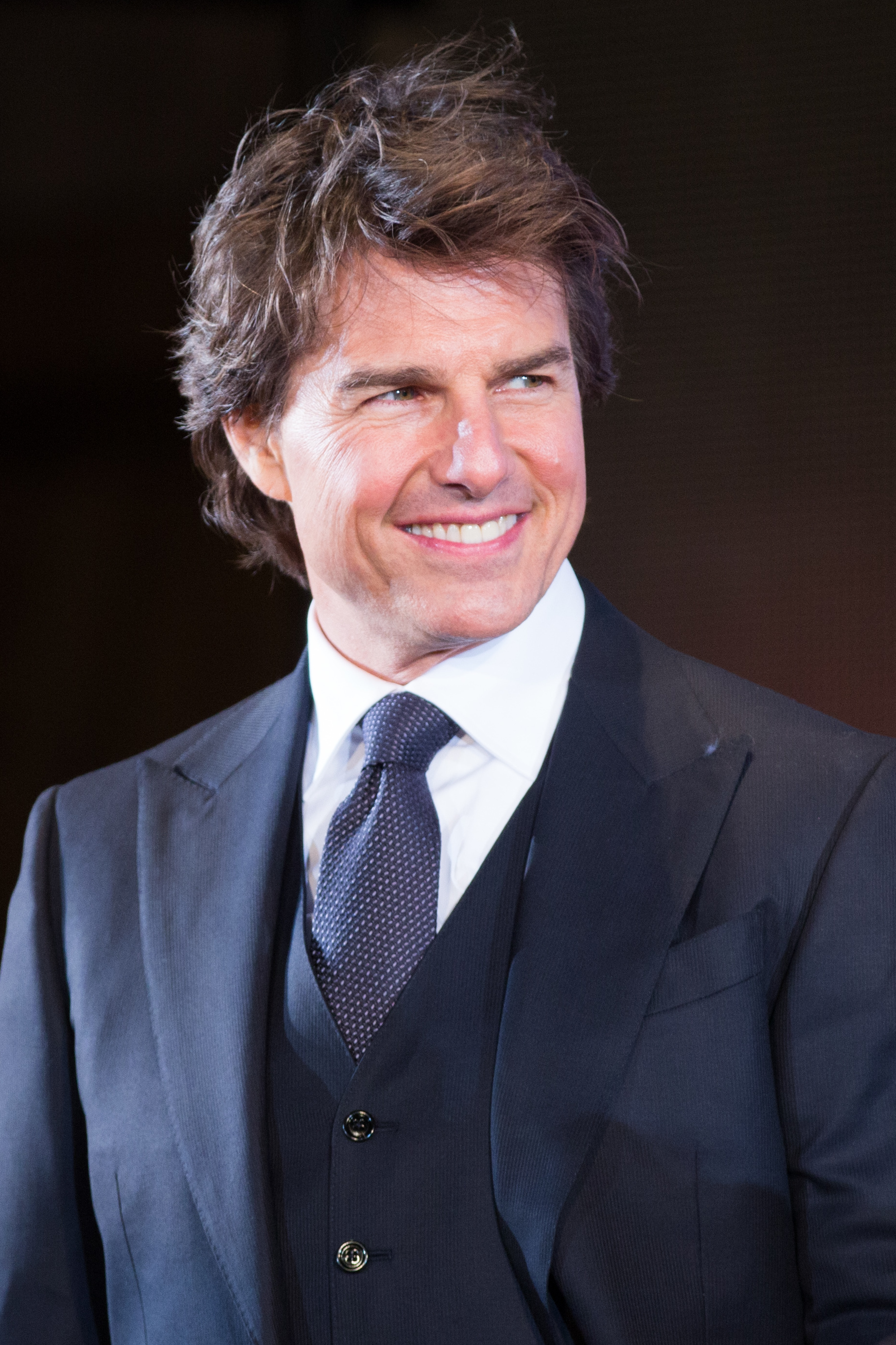 ジャック・リーチャー NEVER GO BACK ジャパン・プレミア レッドカーペット トム・クルーズ